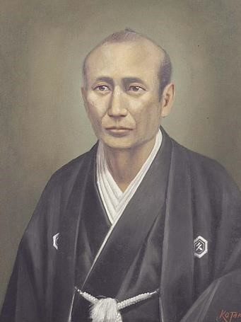 周布政之助の肖像。